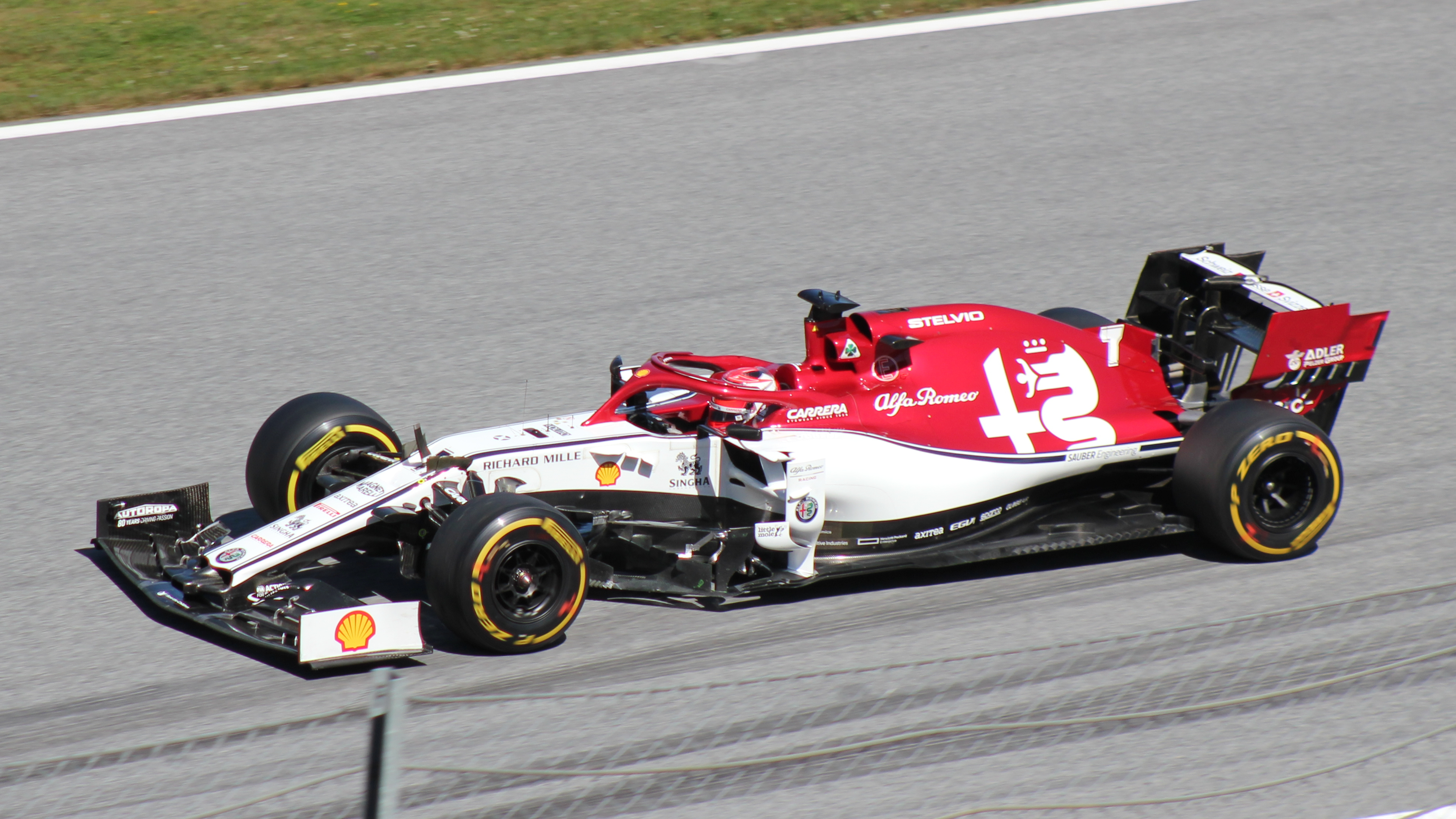 Räikkönen beim Rennwochenende in Österreich 2019